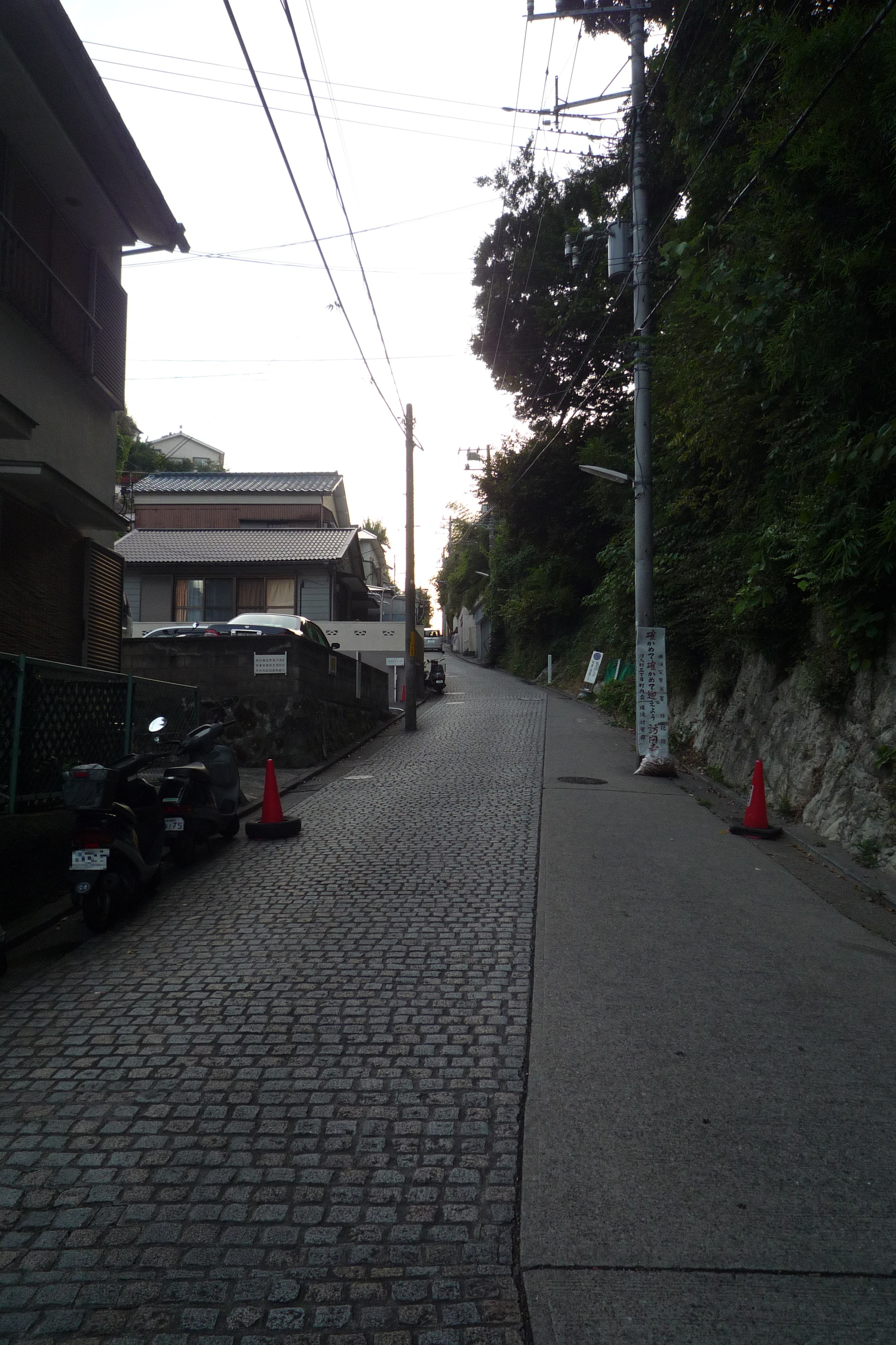 ちこく坂の写真。坂の下より撮影。